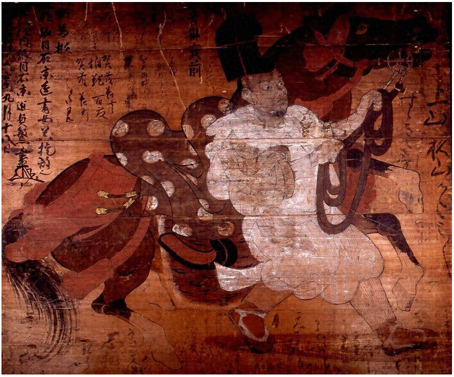 板絵著色神馬図。郷目貞繁筆。永禄六年（1563年）9月奉納の記銘。若松寺所蔵（山形県天童市）。